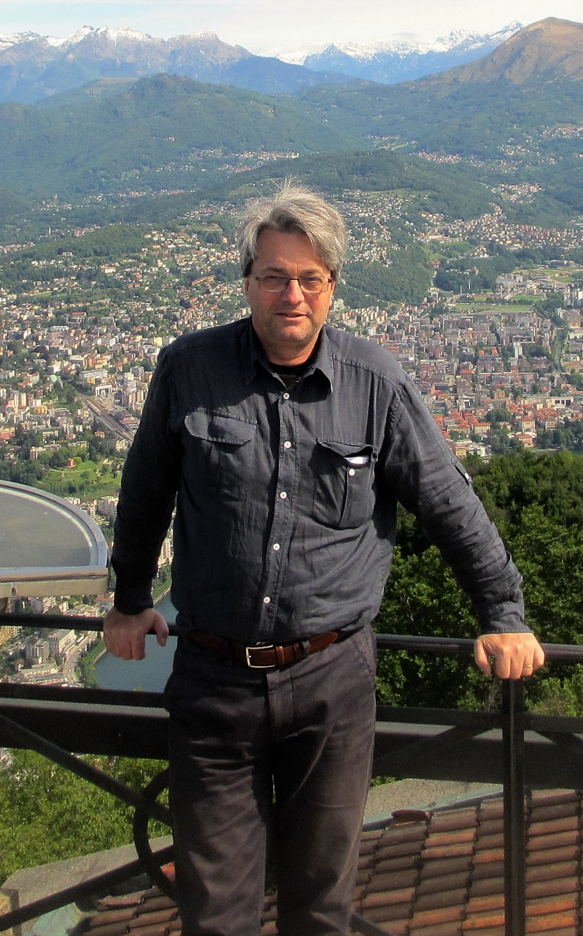 Författaren Luca Cesarini på resa i Lugano